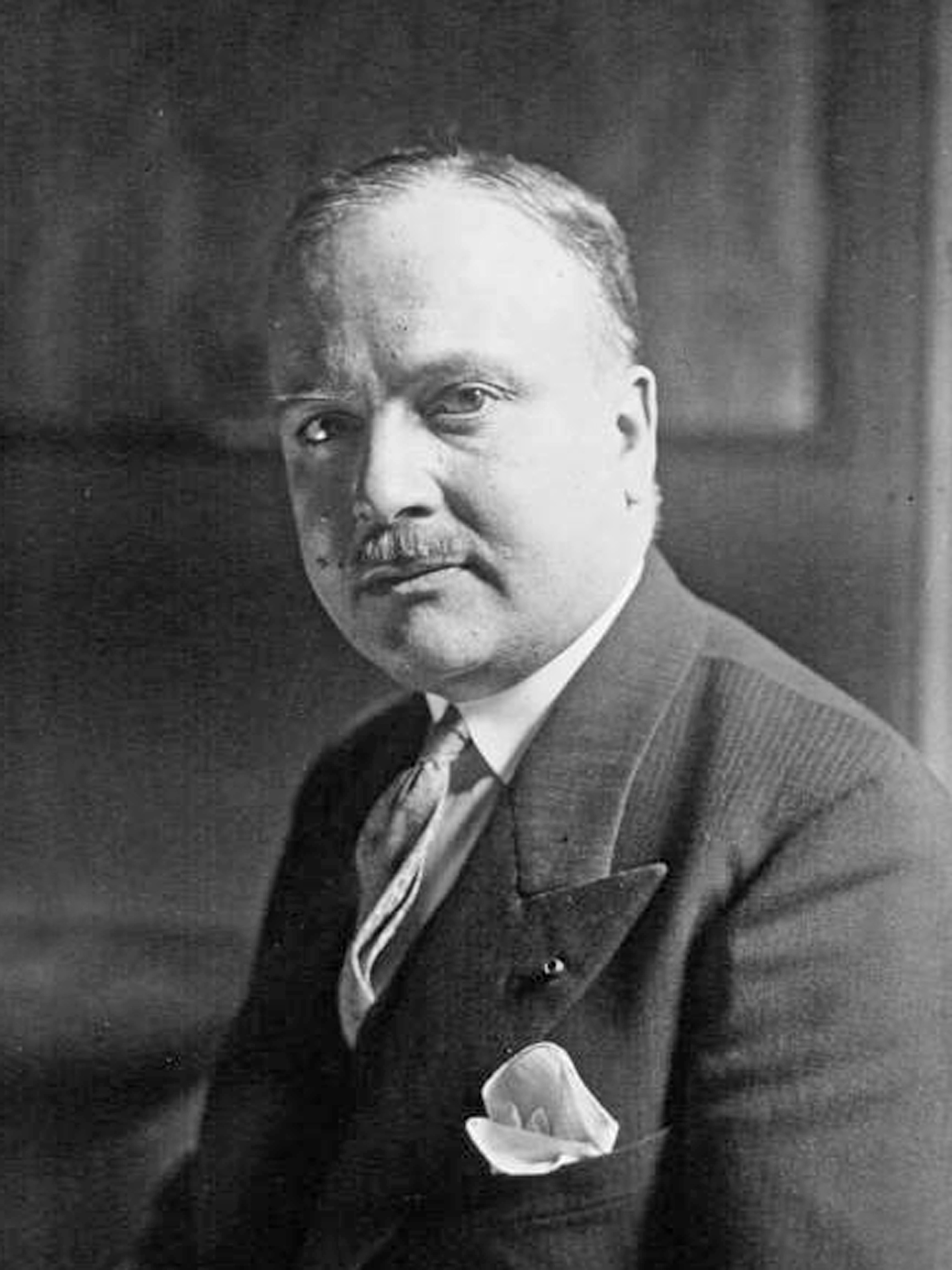 M. Gignoux, député de la Loire (portrait) [photographie de presse]